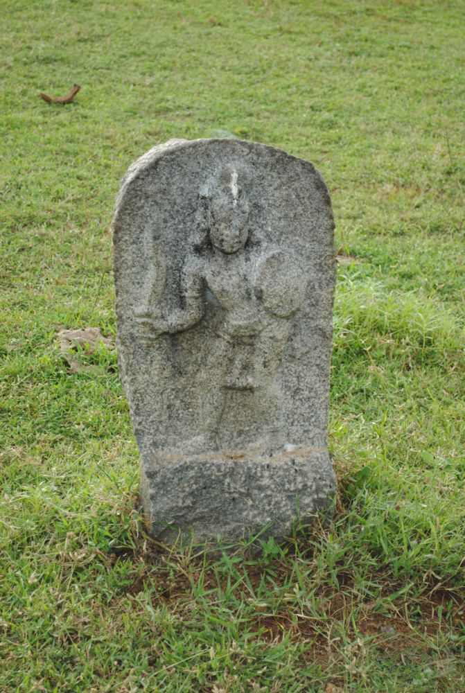 தேவிகாபுரம் பொன்மலை நாதர் மலையின் பின்புறம் உள்ள இந்நடுகல் 15 ஆம் நூற்றாண்டைச்சார்ந்தது. தற்போது ரியல் எஸ்டேட் காரர்களால் ஆபத்தை நோக்கியுள்ளது.